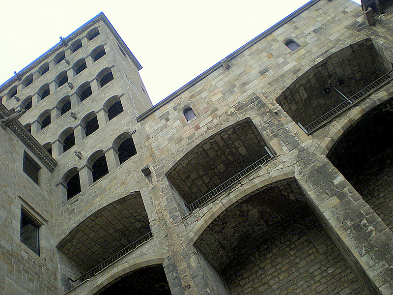 Barcelona - Torre de Palau Reial Major. Segles XI-XVI